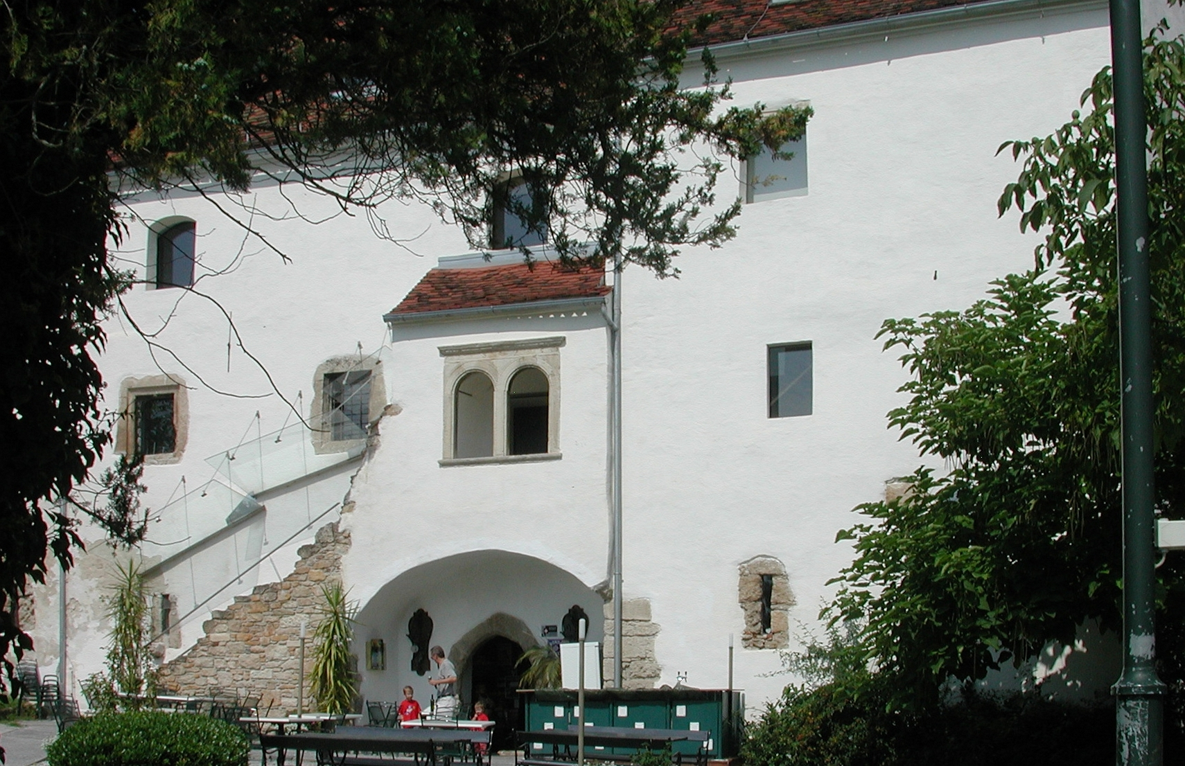 Schloss Hartberg Detailansicht auf den Rittersaal